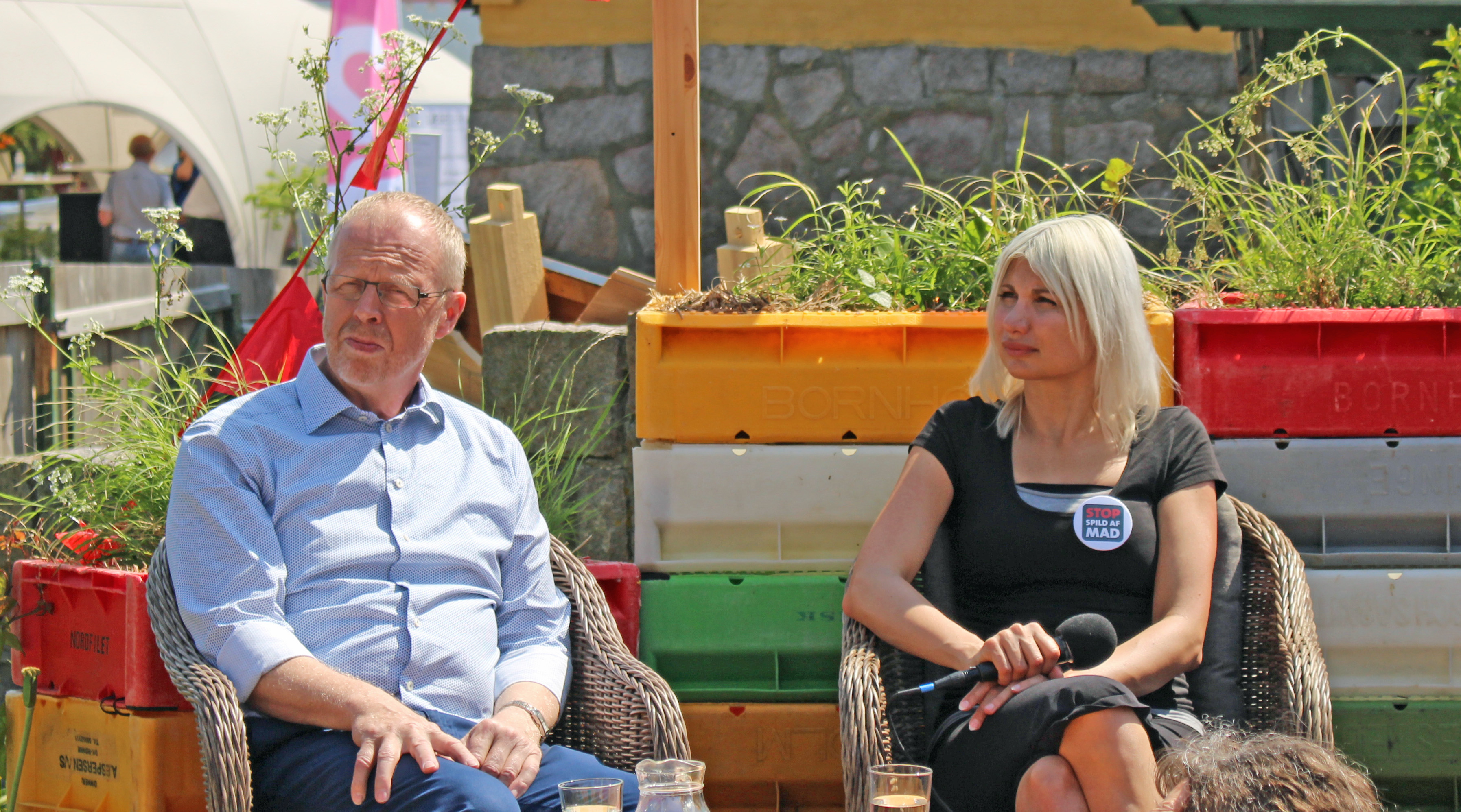 Informations arrangement med Selina Juul, Folkemødet 2015. Manden til venstre må være landmand Steen Nørgaard Madsen.